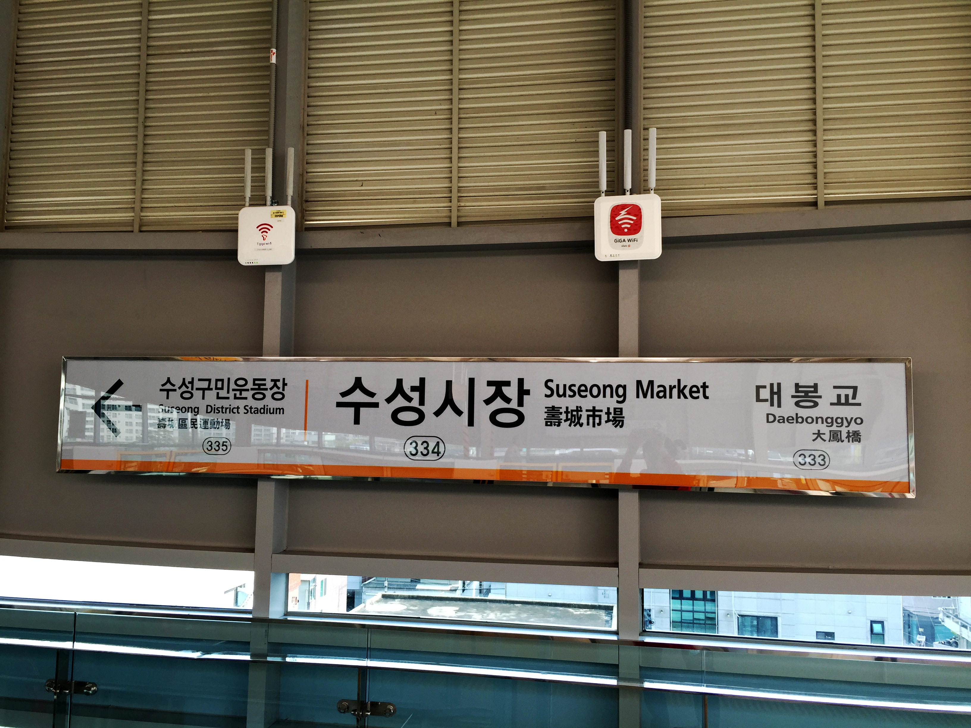 수성시장역 역명판